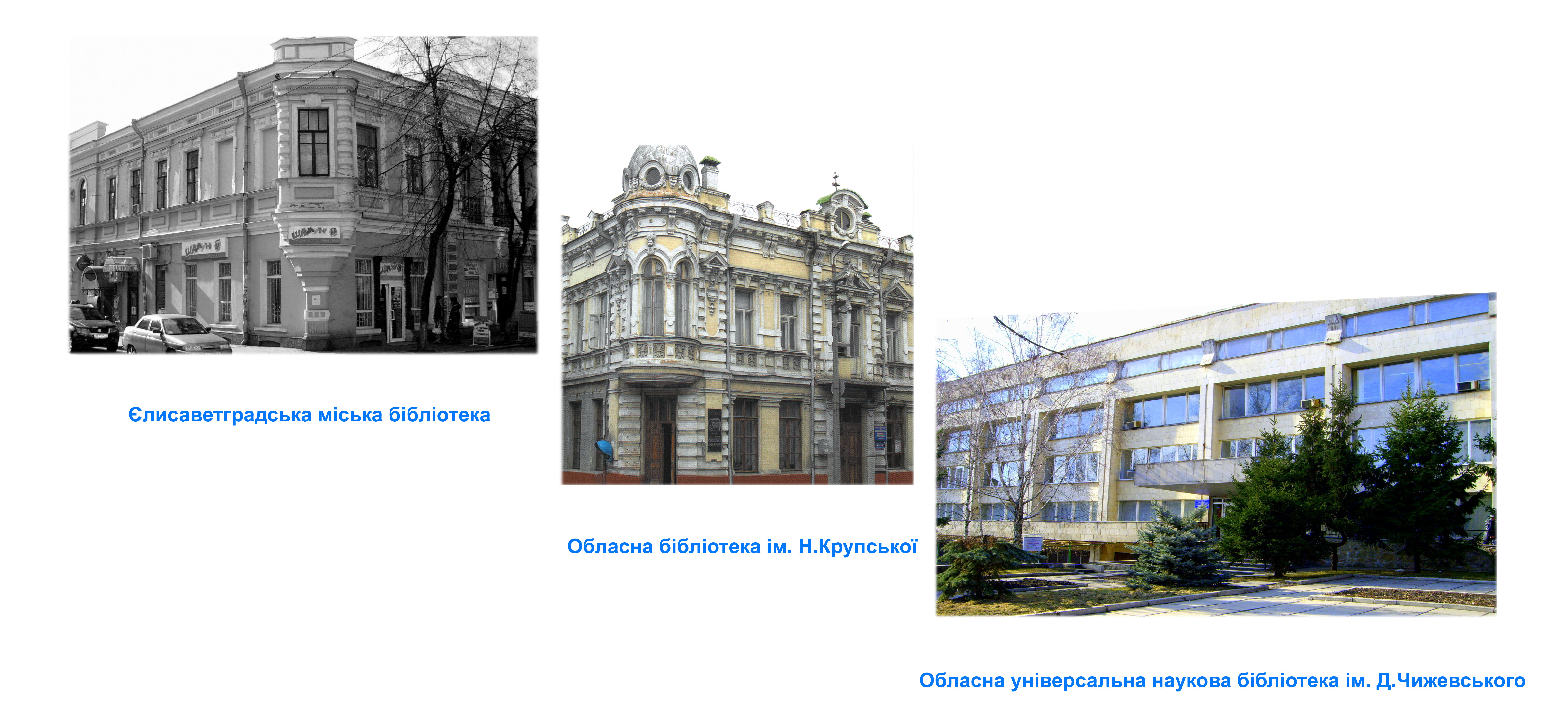 Історія бібліотеки